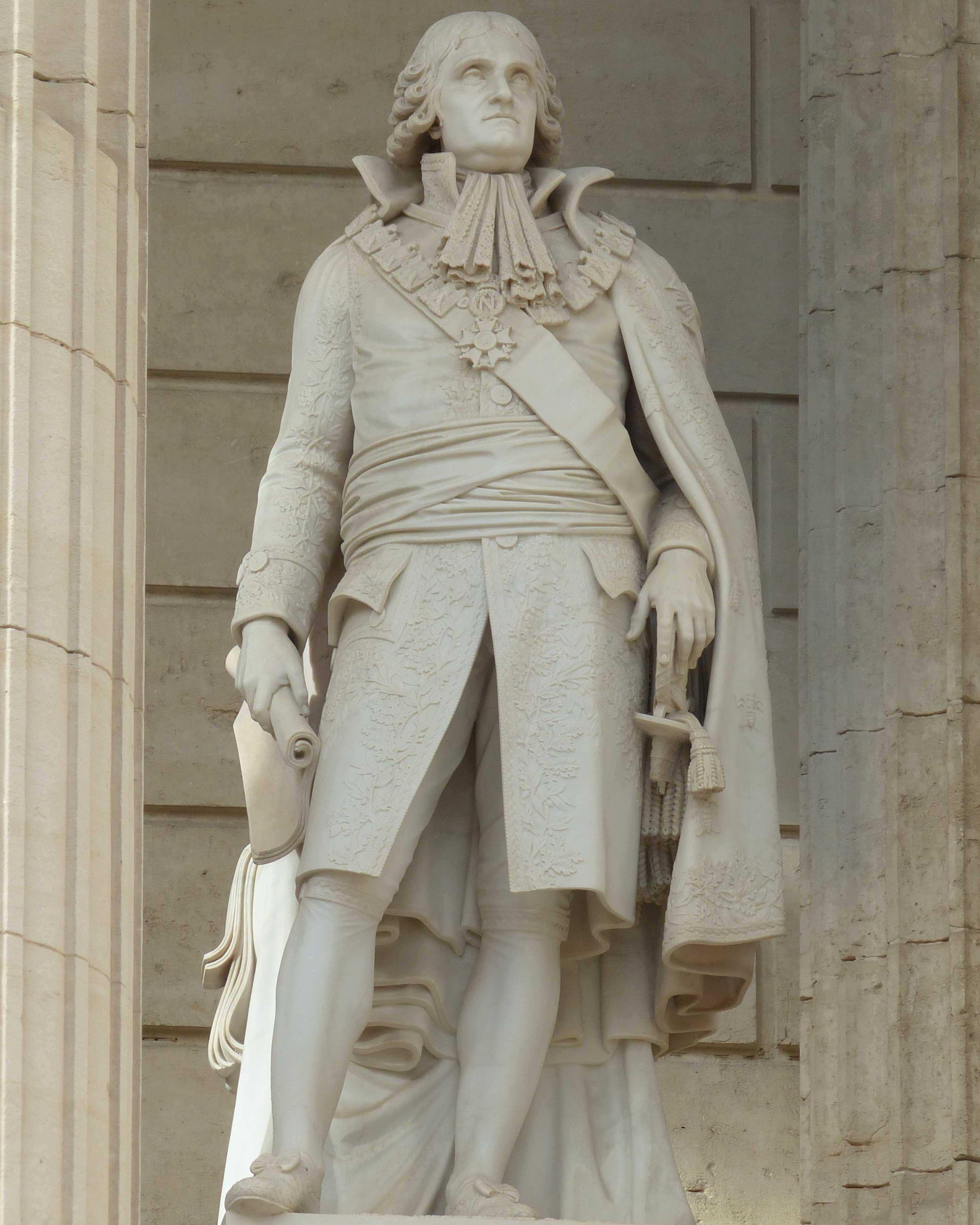 Montpellier (Hérault, France), palais de Justice, siège de la Cour d'appel, statue de Jacques de Cambacérès.